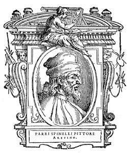 Illustratio from "Le Vite" by Giorgio Vasari, edition of 1568.